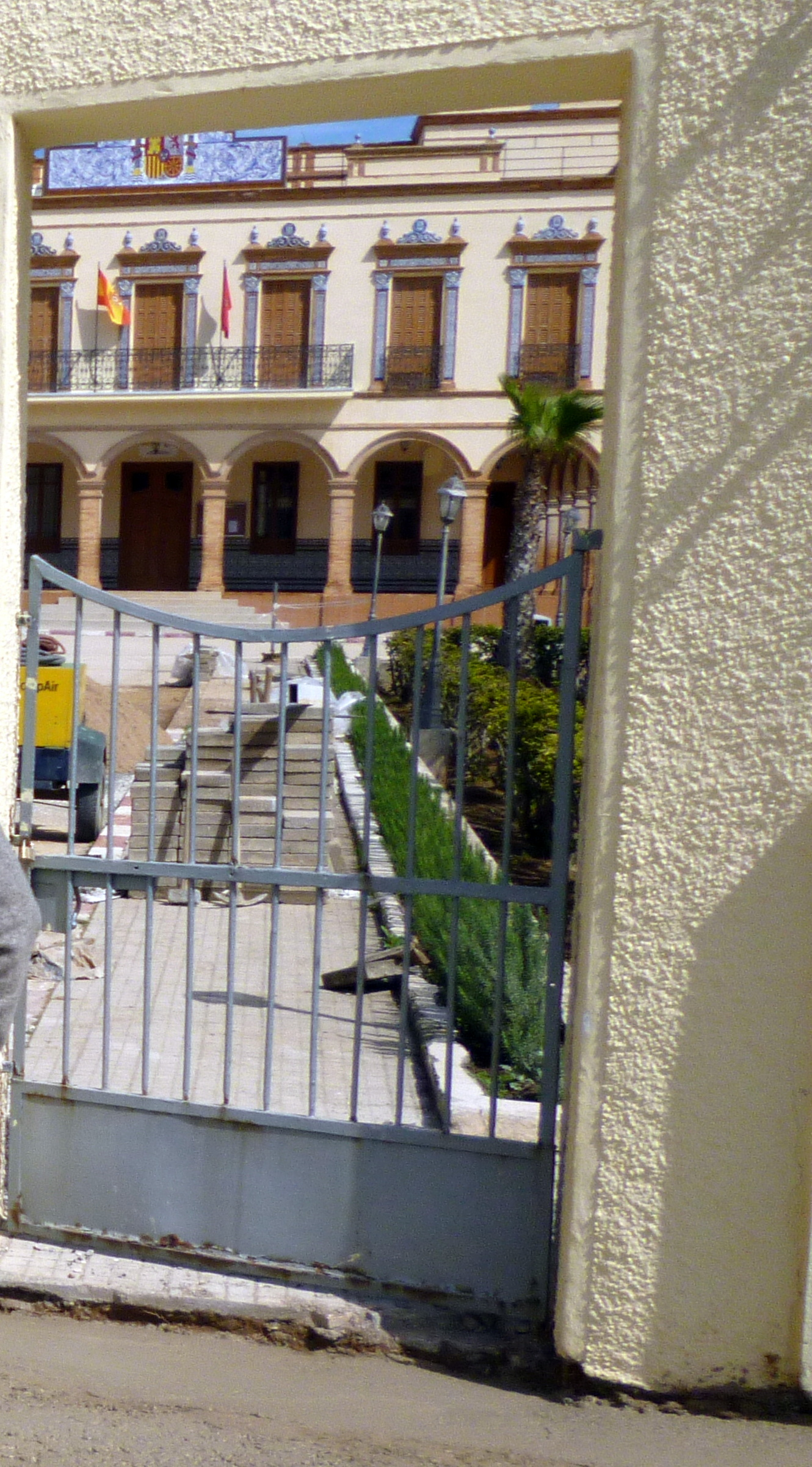 Instituto Español Melchor de Jovellanos